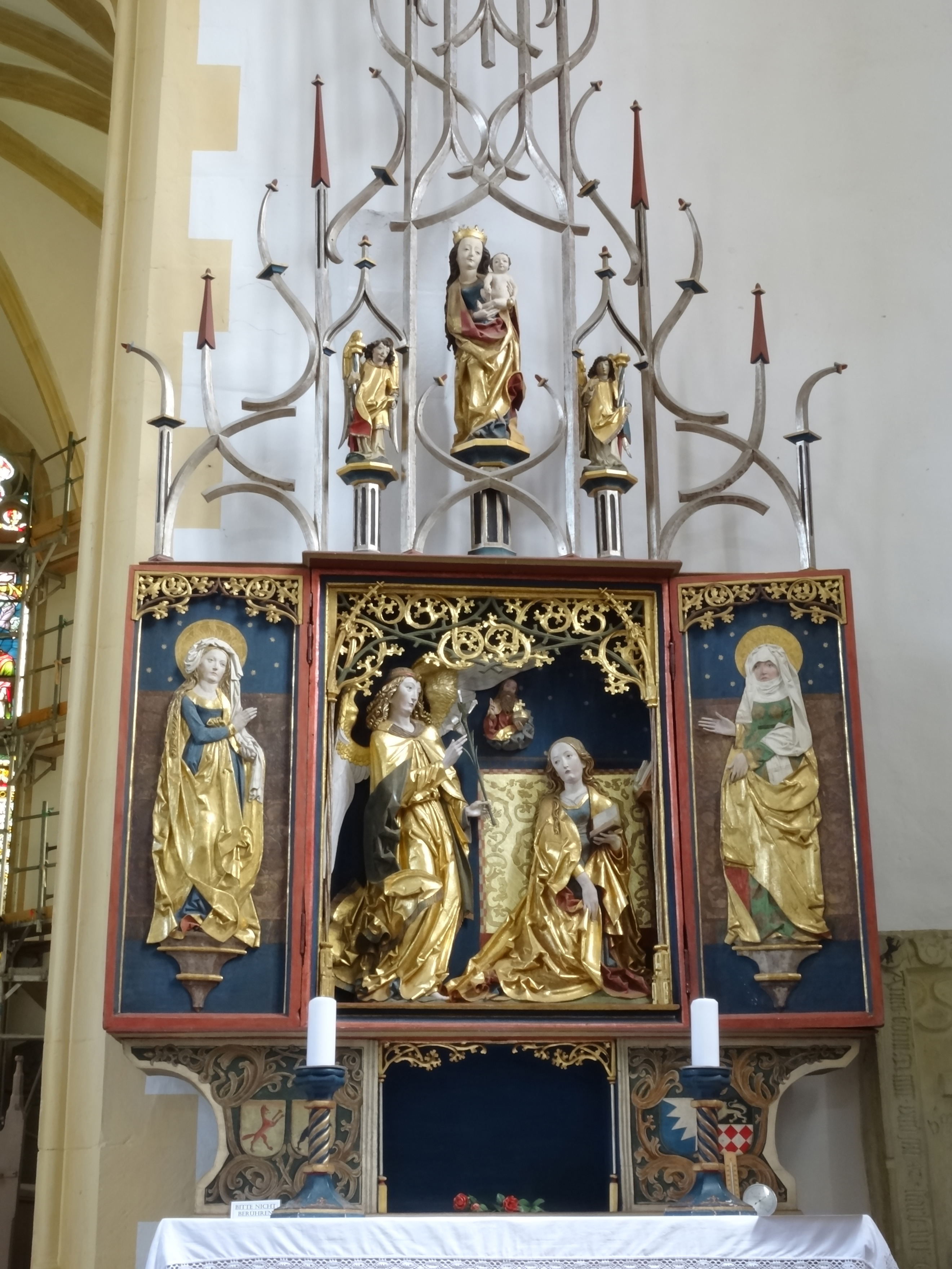 St. Leo (Bibra), Verkündigungsaltar aus der Riemenschneider-Werkstatt